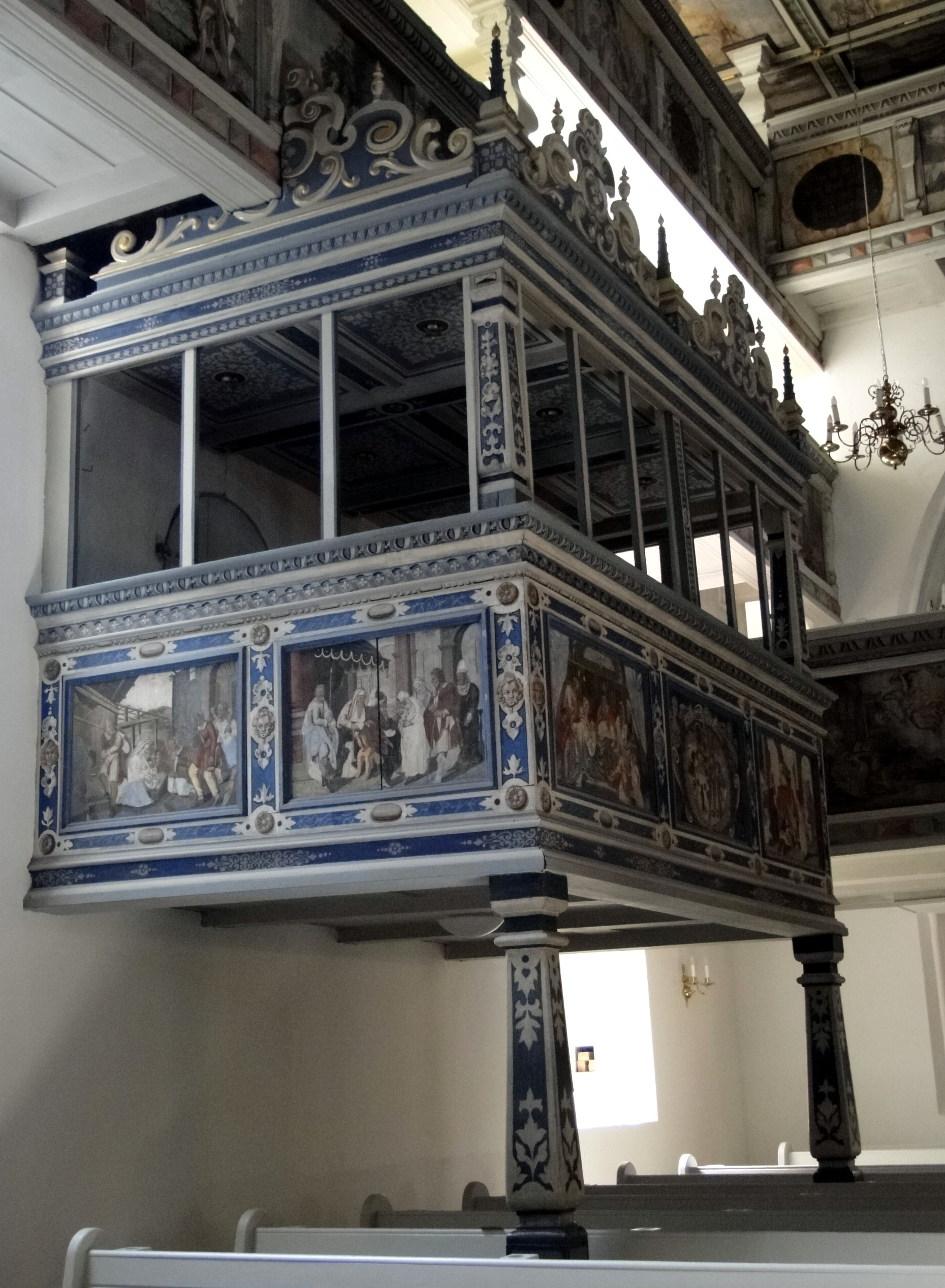 Nöthnitzer Betstube Kirche Leubnitz-Neuostra